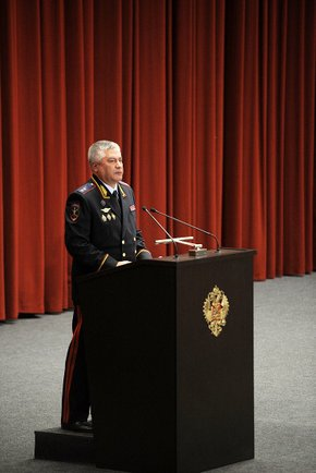 Министр внутренних дел Владимир Колокольцев